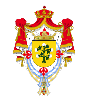 Armas de Cotoner GdE GC OC